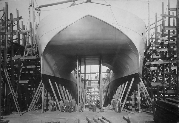 U-Boothebeschiff S.M.S „Vulkan“. Gebaut bei den Howaldtswerken in Kiel, Stapellauf 28. September 1907, Baunummer #473